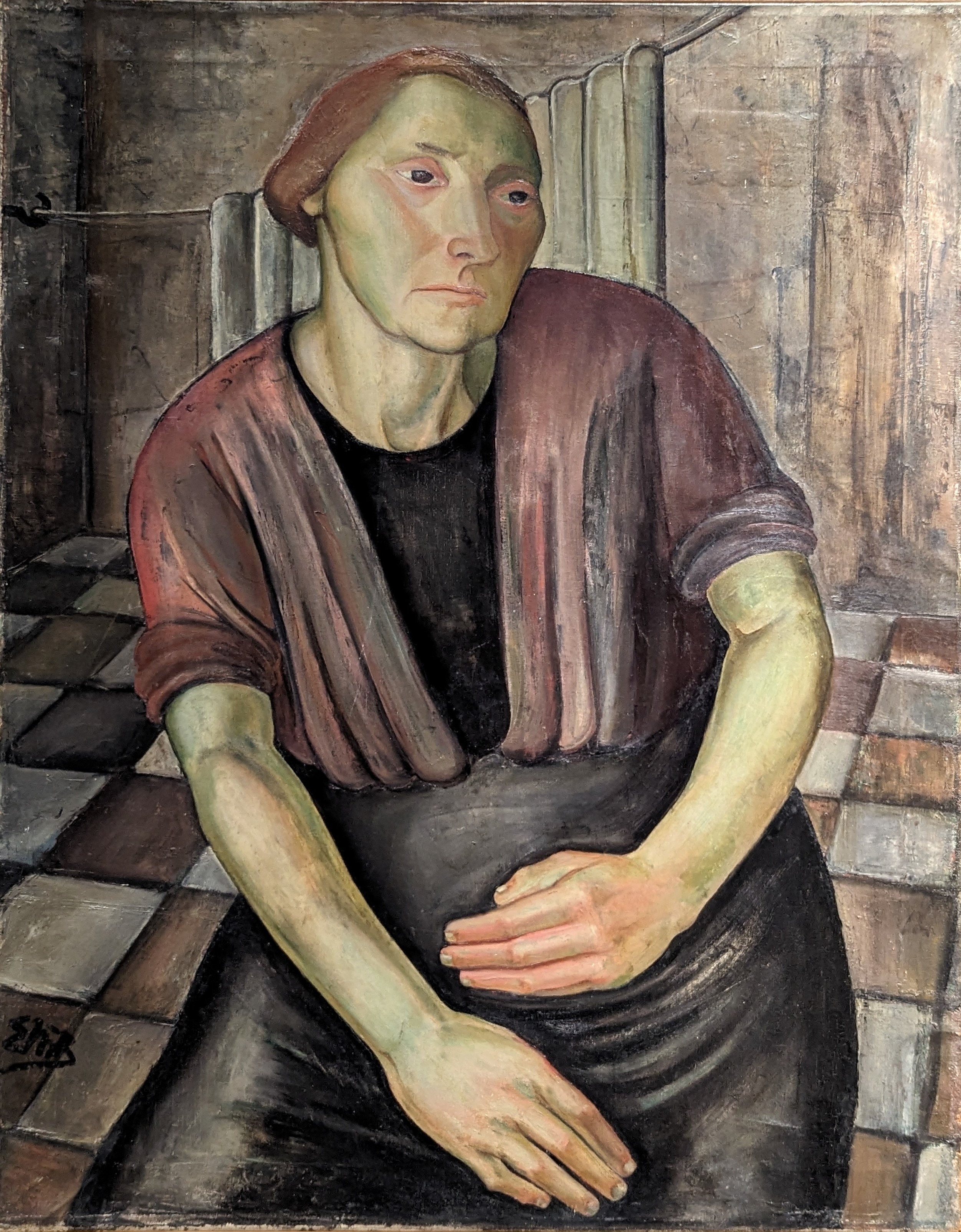 Maleri i brunlige farver.Vaskekone på Sicilien.